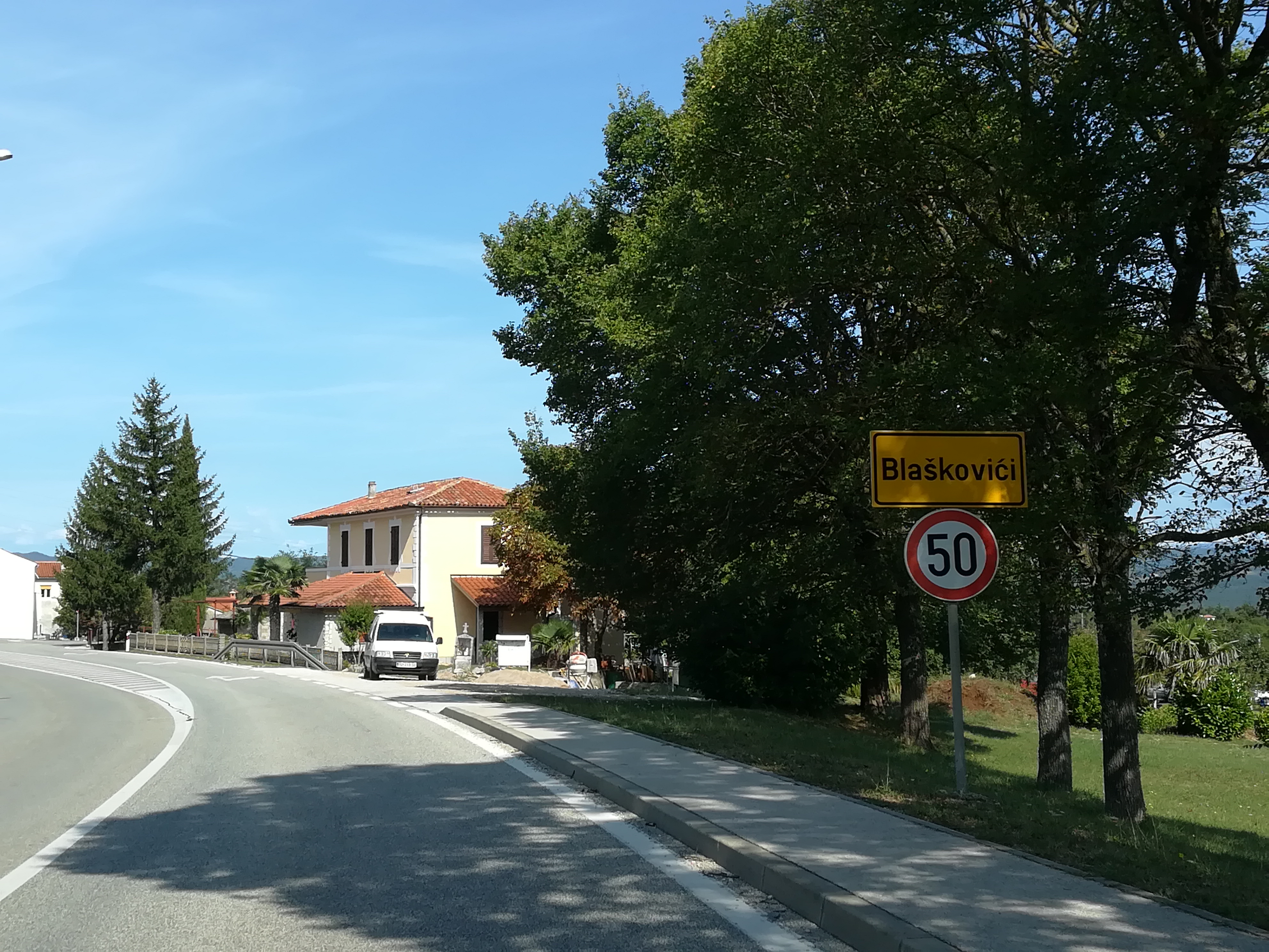 Kršan, Croazia